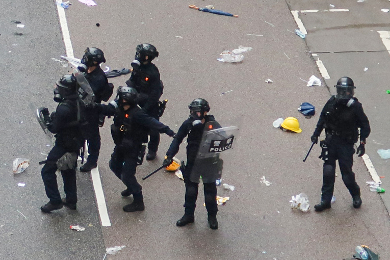 Special Tactical Squad